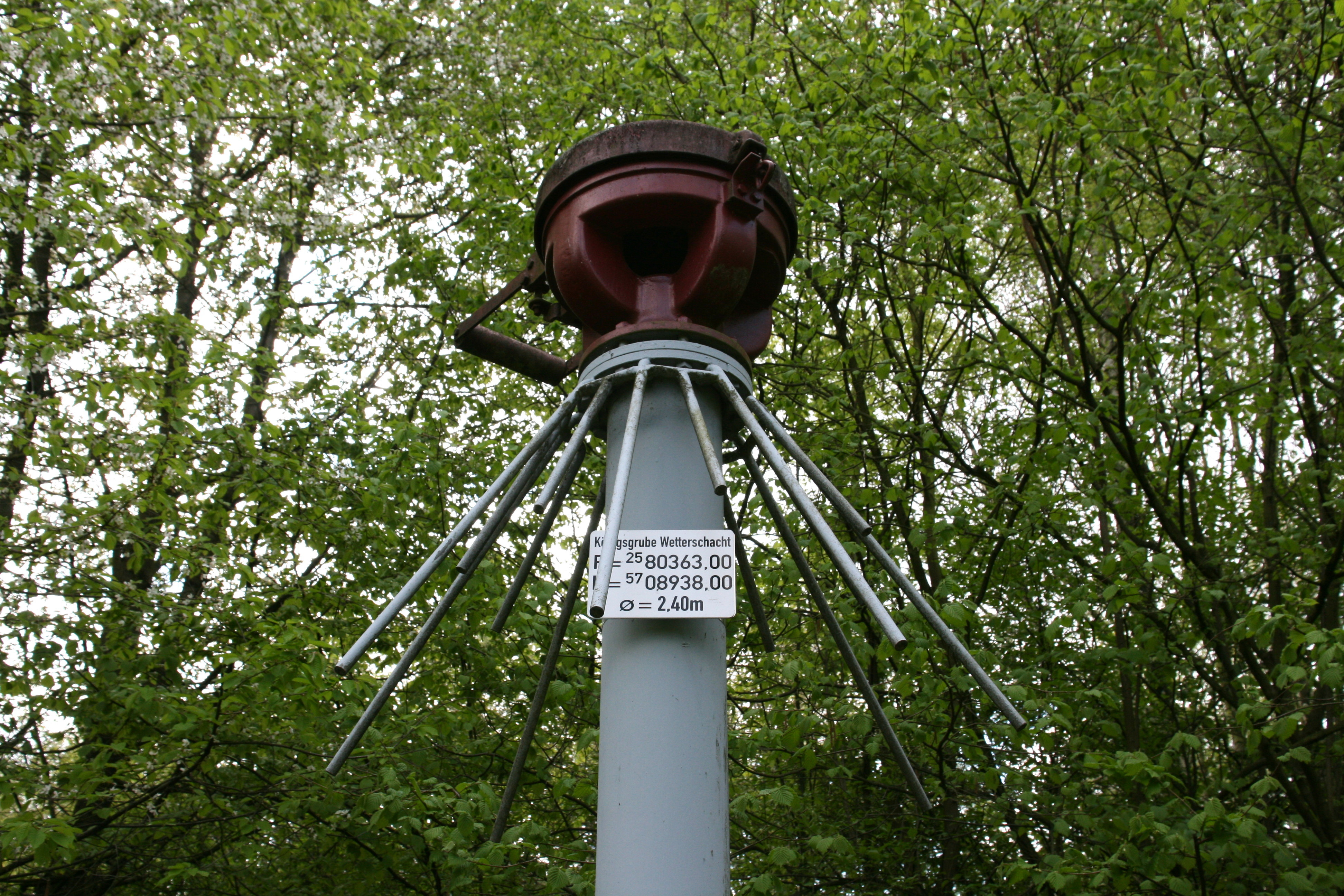 Zeche Königsgrube - Schacht 4 (Wetterschacht), Königsgruber Straße in Herne